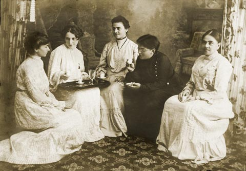 מימין לשמאל: אולגה חנקין, מניה שוחט, סוניה בלקינד, דובה בלקינד, שושנה פיינברג